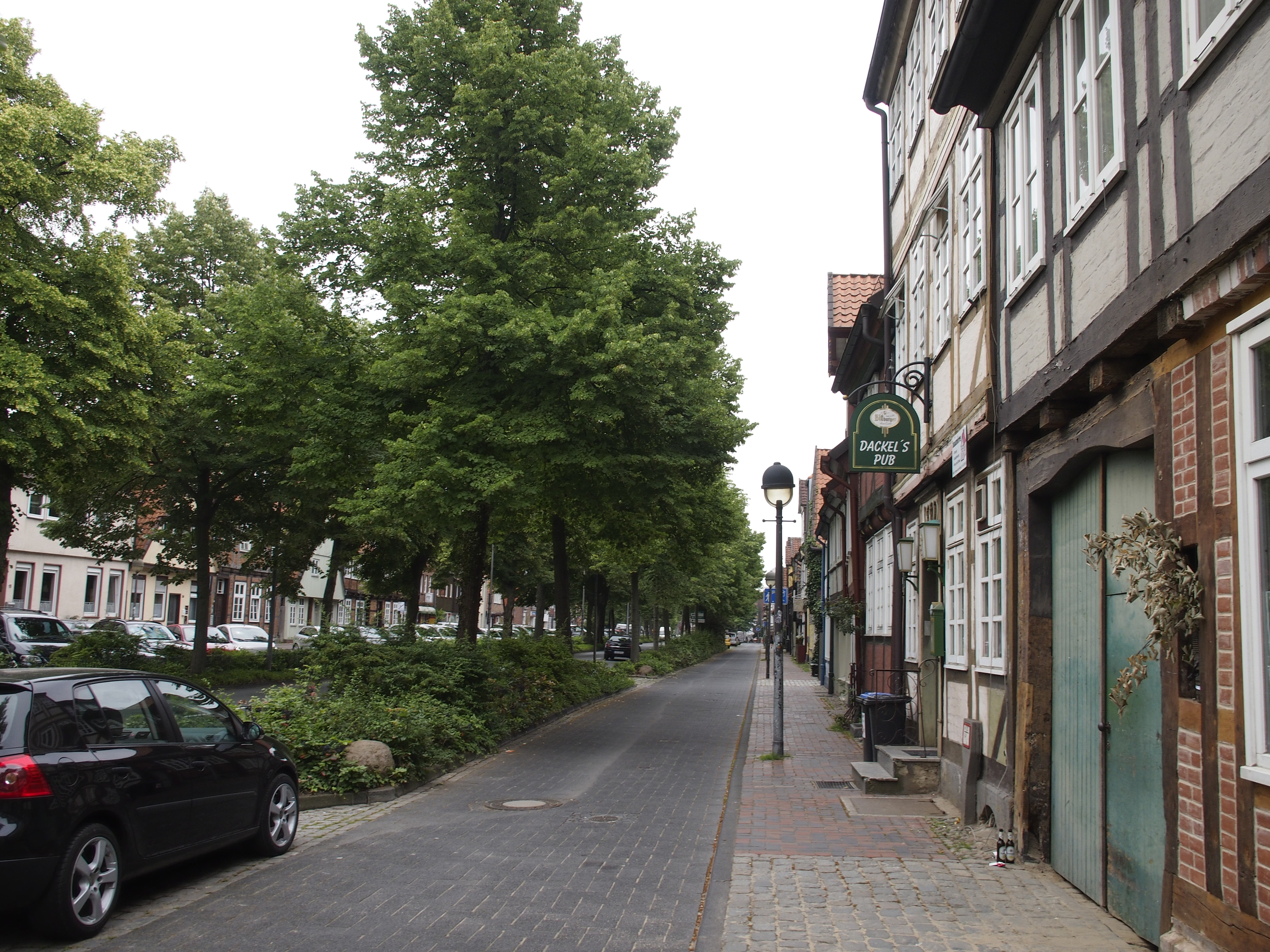 Fachwerkhäuser der Straße "Blumlage", in Celle